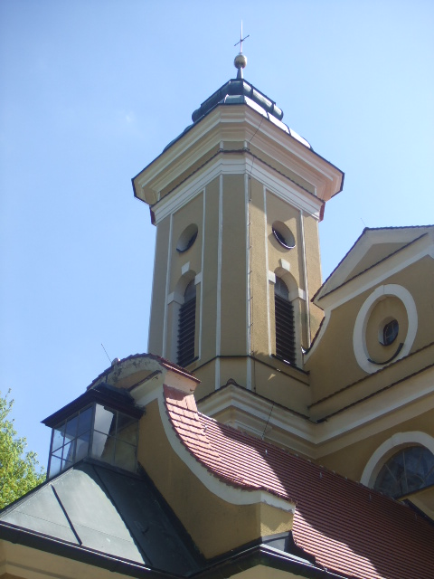 Stetten ob Lontal, Gemeinde Niederstotzingen, Landkreis Heidenheim Wallfahrtskirche